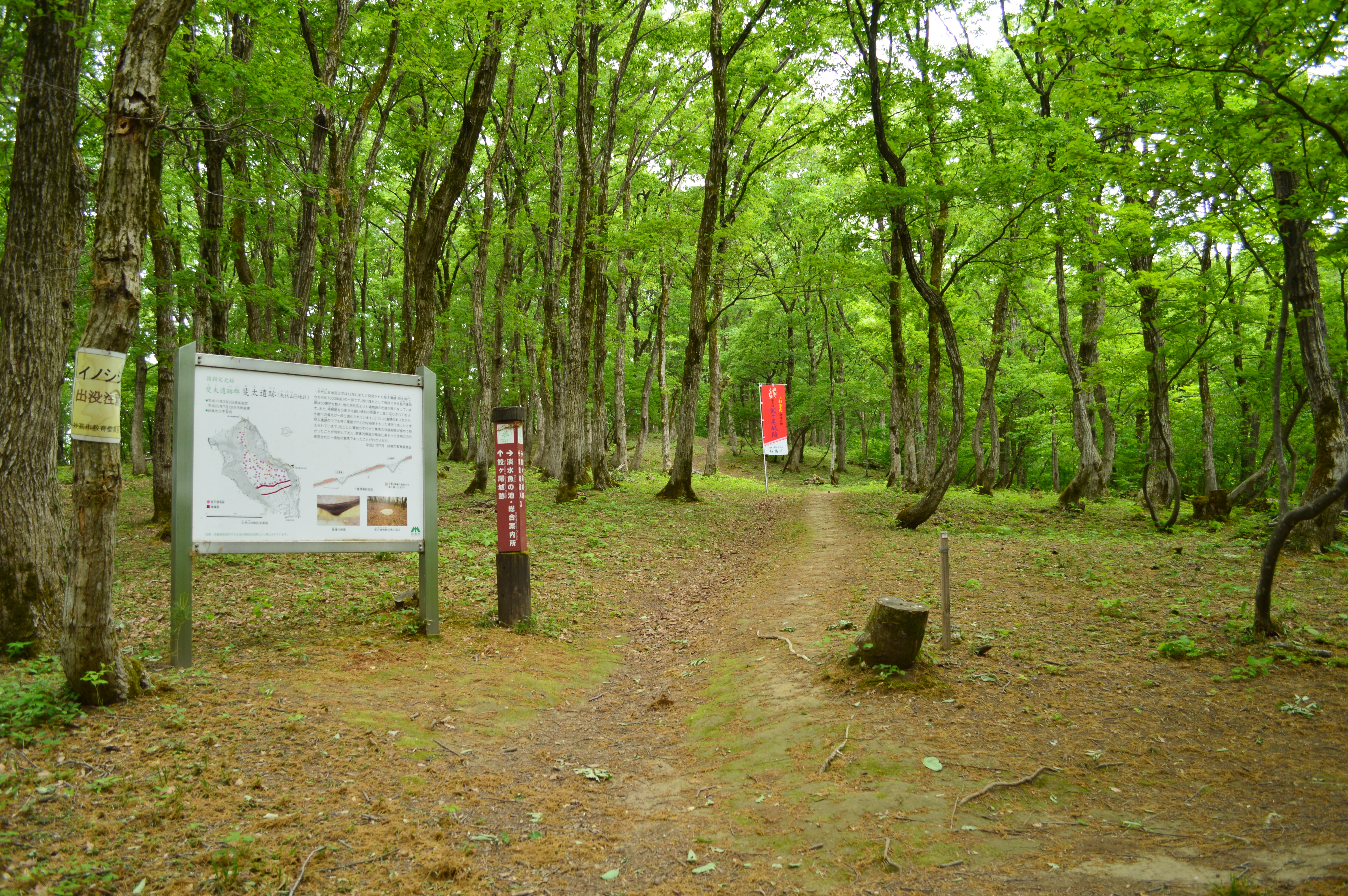 斐太遺跡矢代山B地区 概観